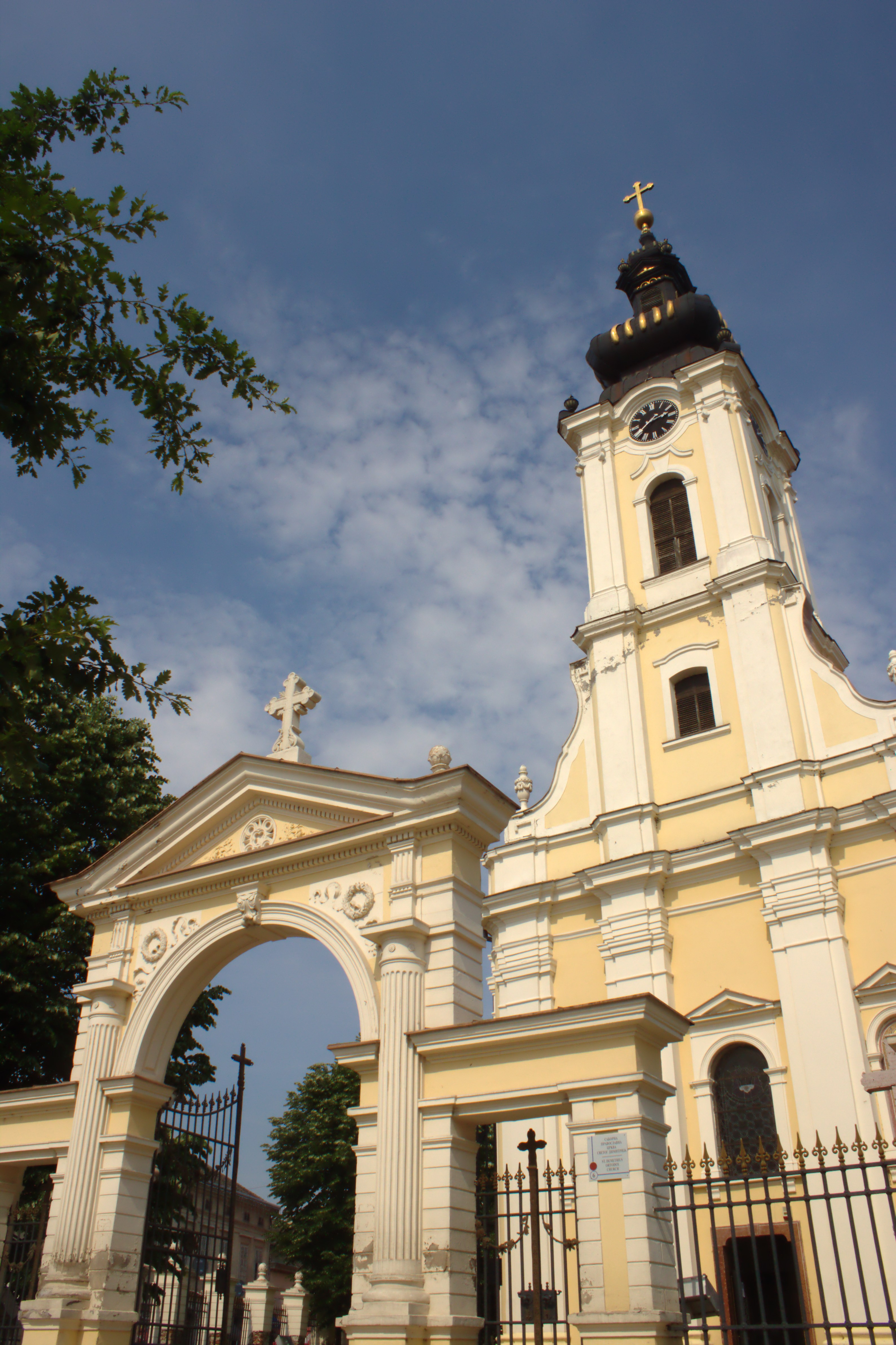 Pravoslavni hram u Sremskoj Mitrovici.